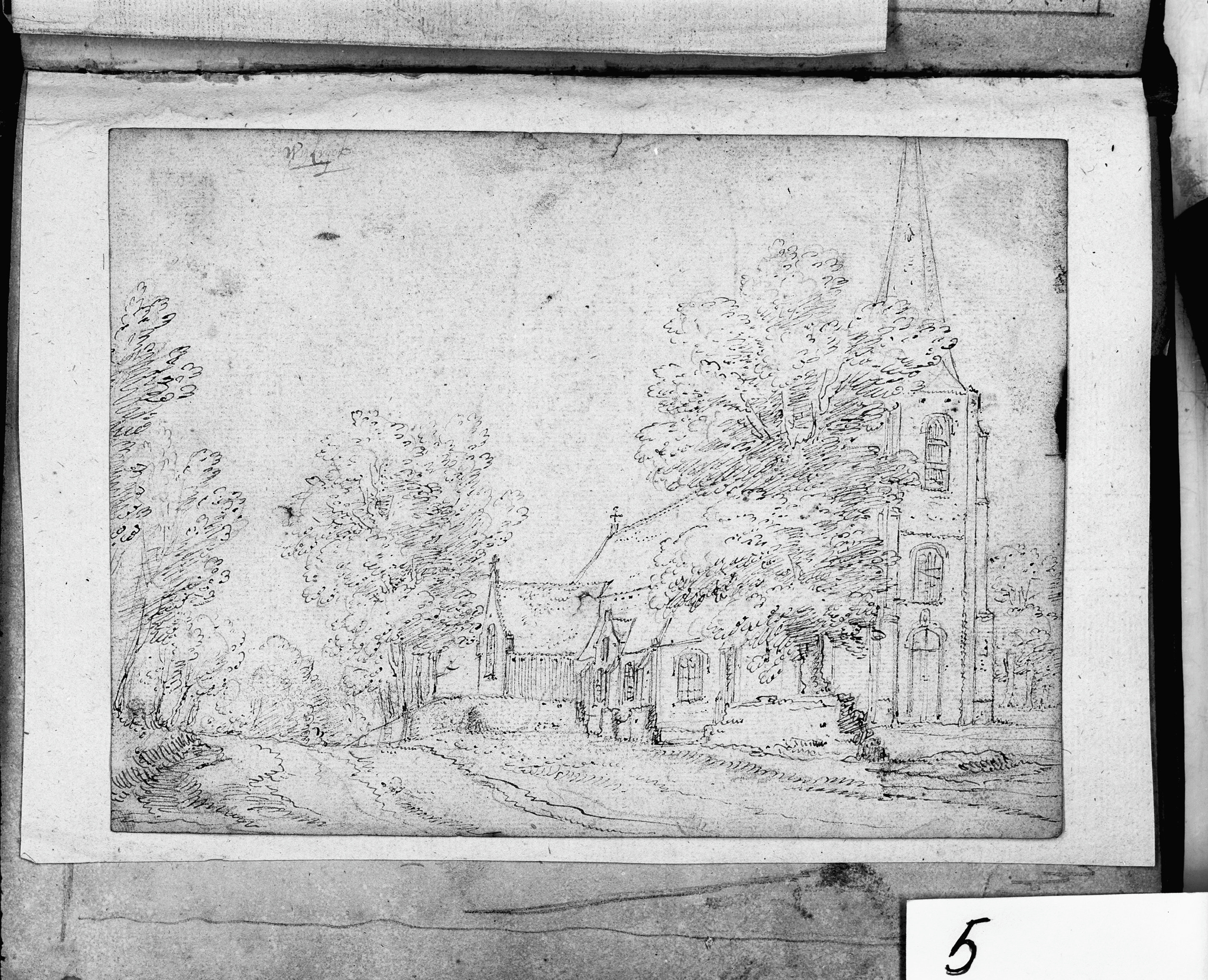 kerk: kerk, tekening uit schetsboek D.Verrijk